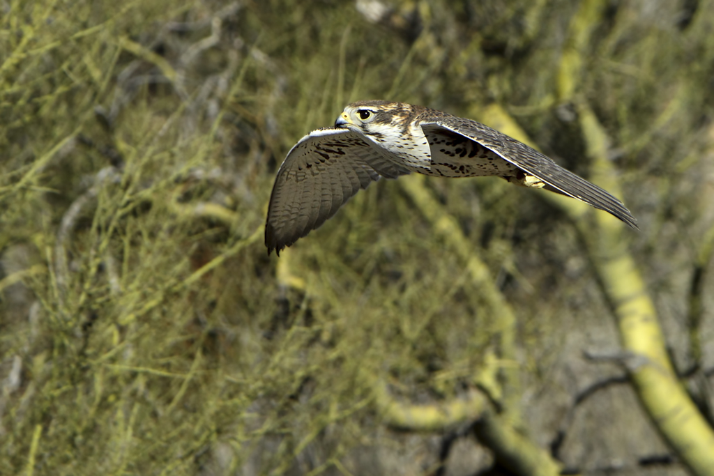 Falco mexicanus, Arizona